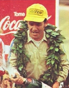 Julio Pardo podio de Turismo Nacional clase B 1979.